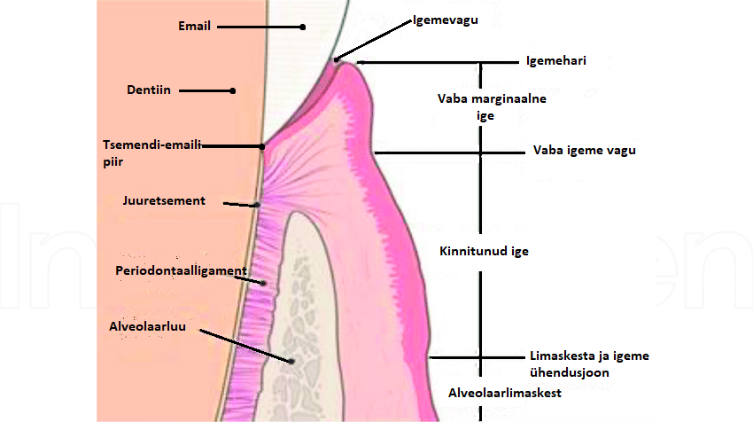 Parodondi makroskoopilised struktuurid. Kirjad muudetud eestikeelseks.